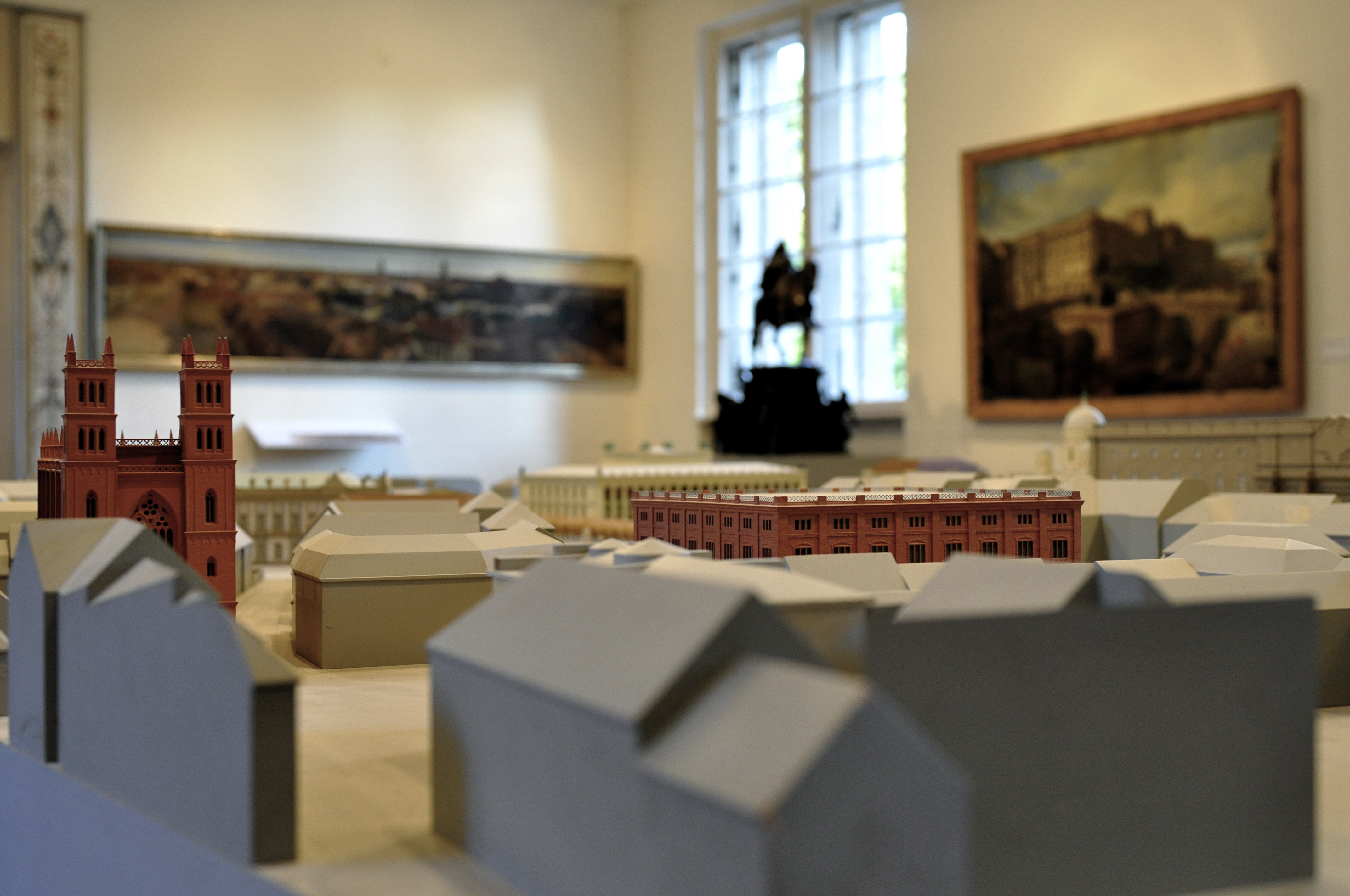 Foto Faruk Hosseini